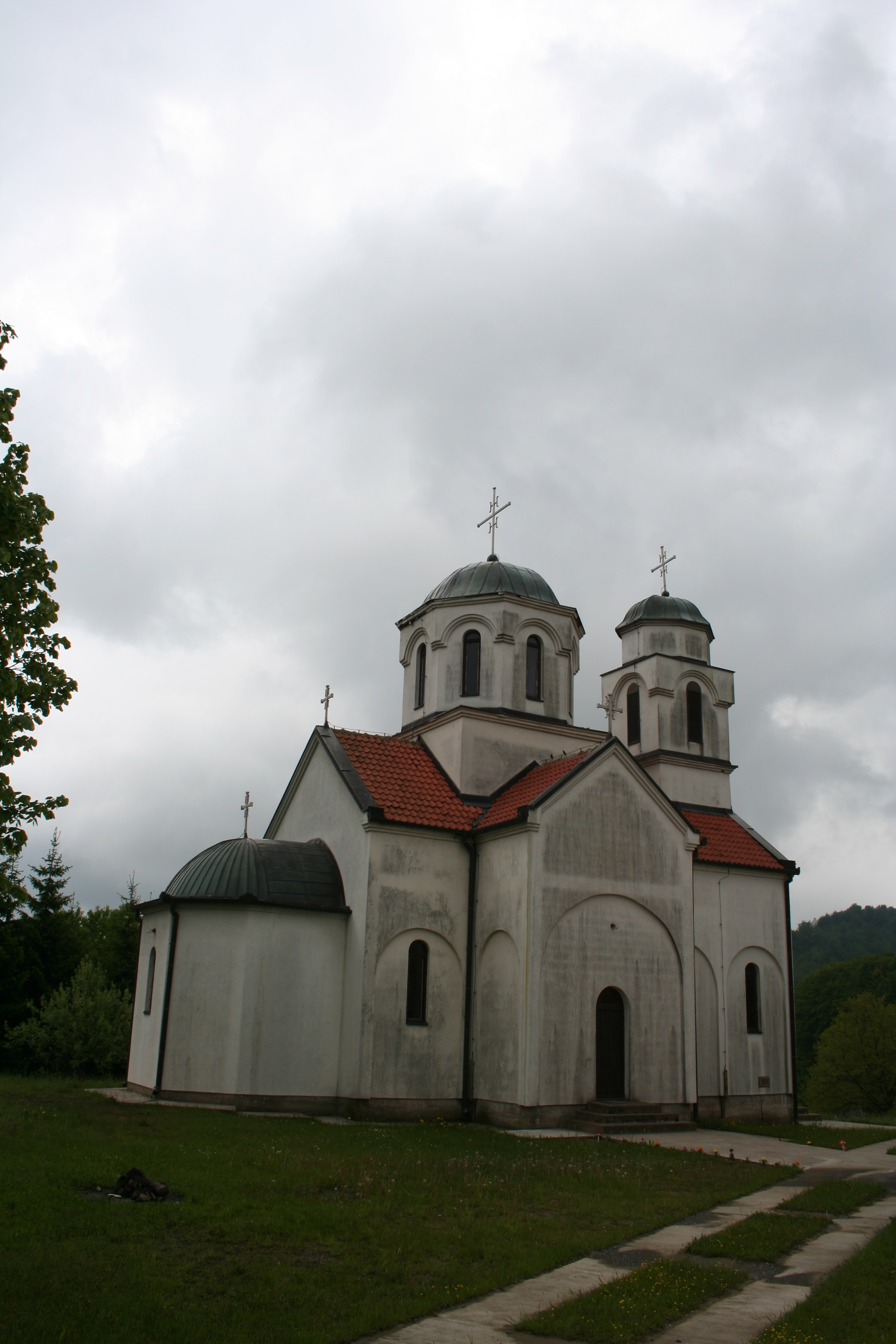 Crkva Sv. apostola Petra i Pavla, Pašino Polje